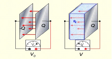 Impedancia